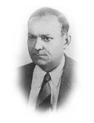 عکس اقبال (وفات ۱۳۳۴)